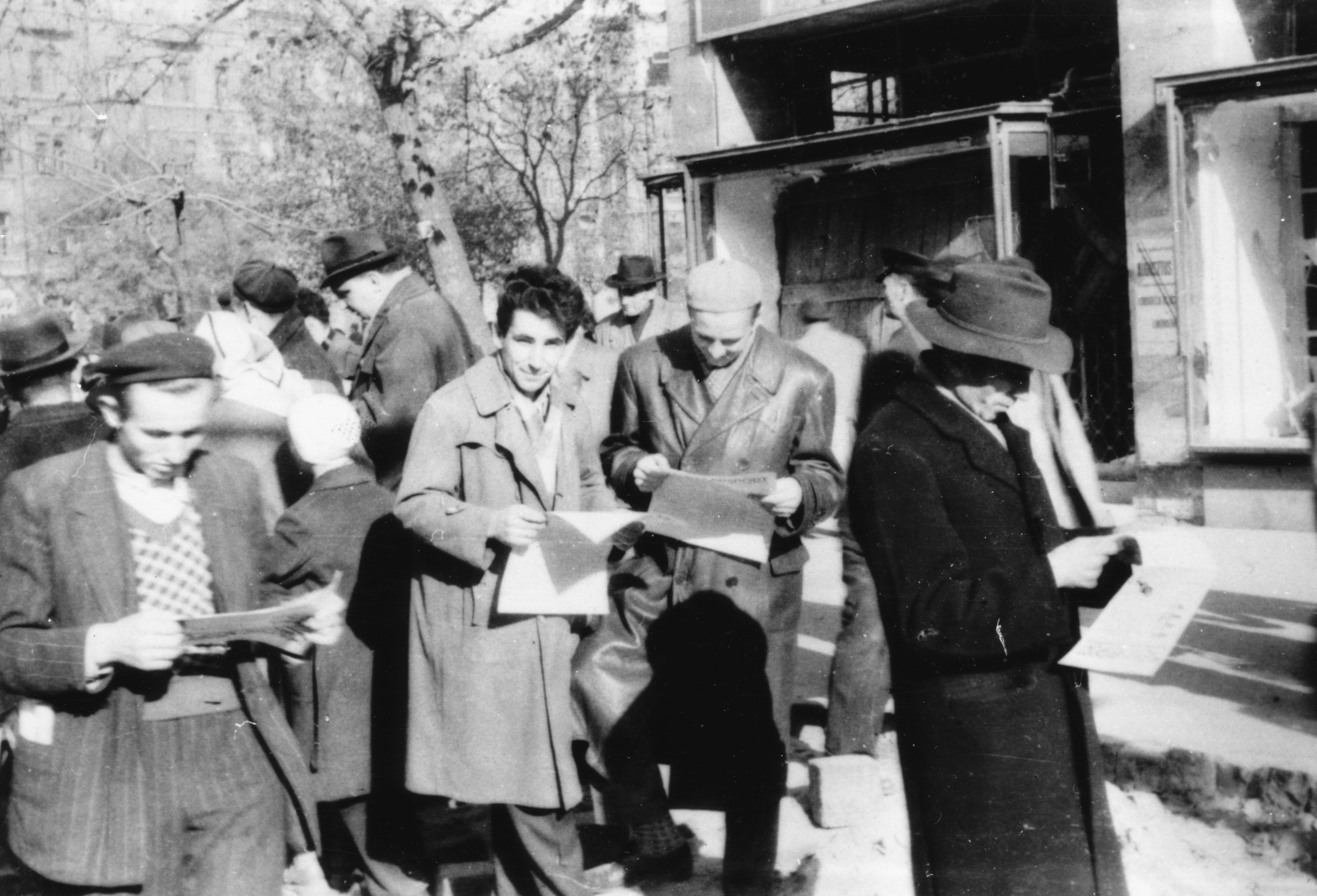 Rákóczi tér - József körút sarok. Location: Hungary, Budapest VIII. Tags: revolution, street view, newspaper, hat, beret, leather jacket, Budapest Title: Rákóczi tér - József körút sarok.